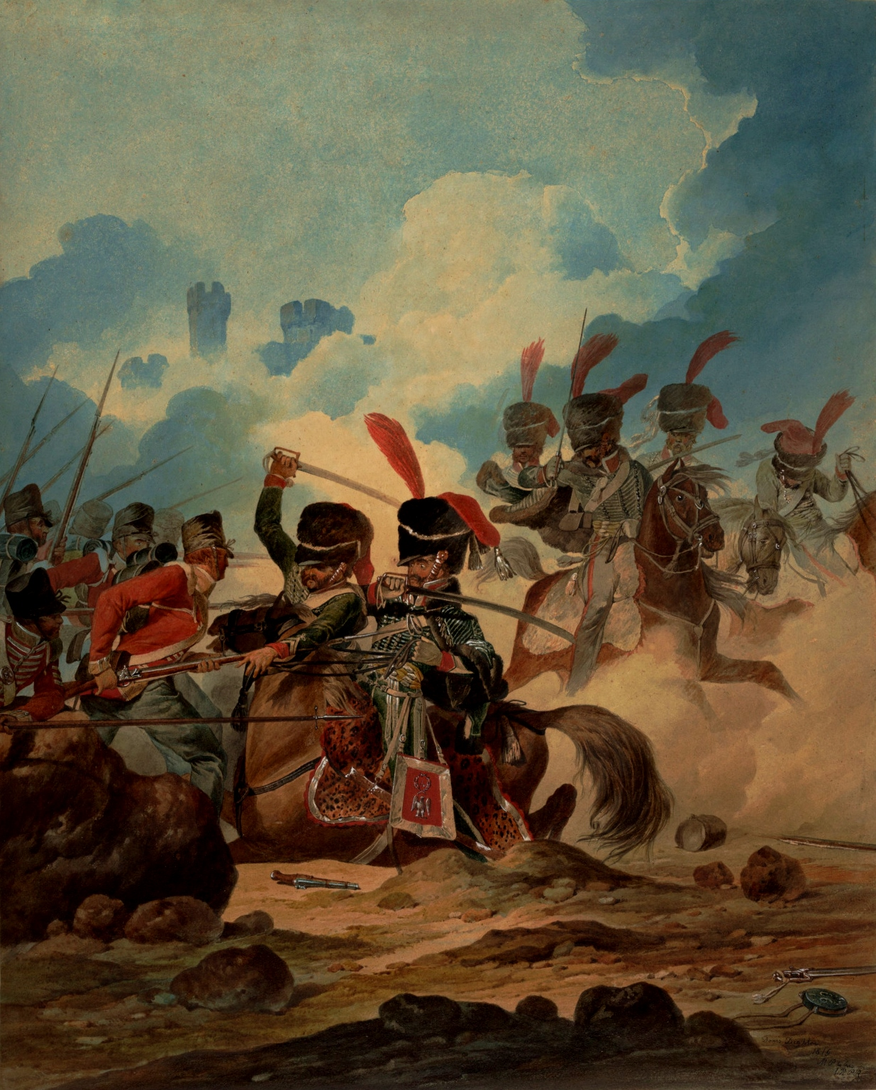 L'infanterie britannique attaque un groupe d'artilleurs à cheval de la Garde impériale au cours de la bataille de Waterloo, le 18 juin 1815.